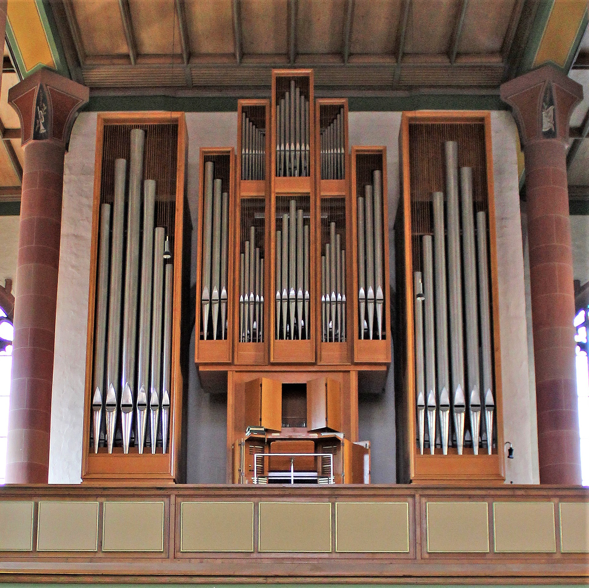 Orgelprospekt der evangelischen Alexanderskirche in Zweibrücken, Rheinland-Pfalz.